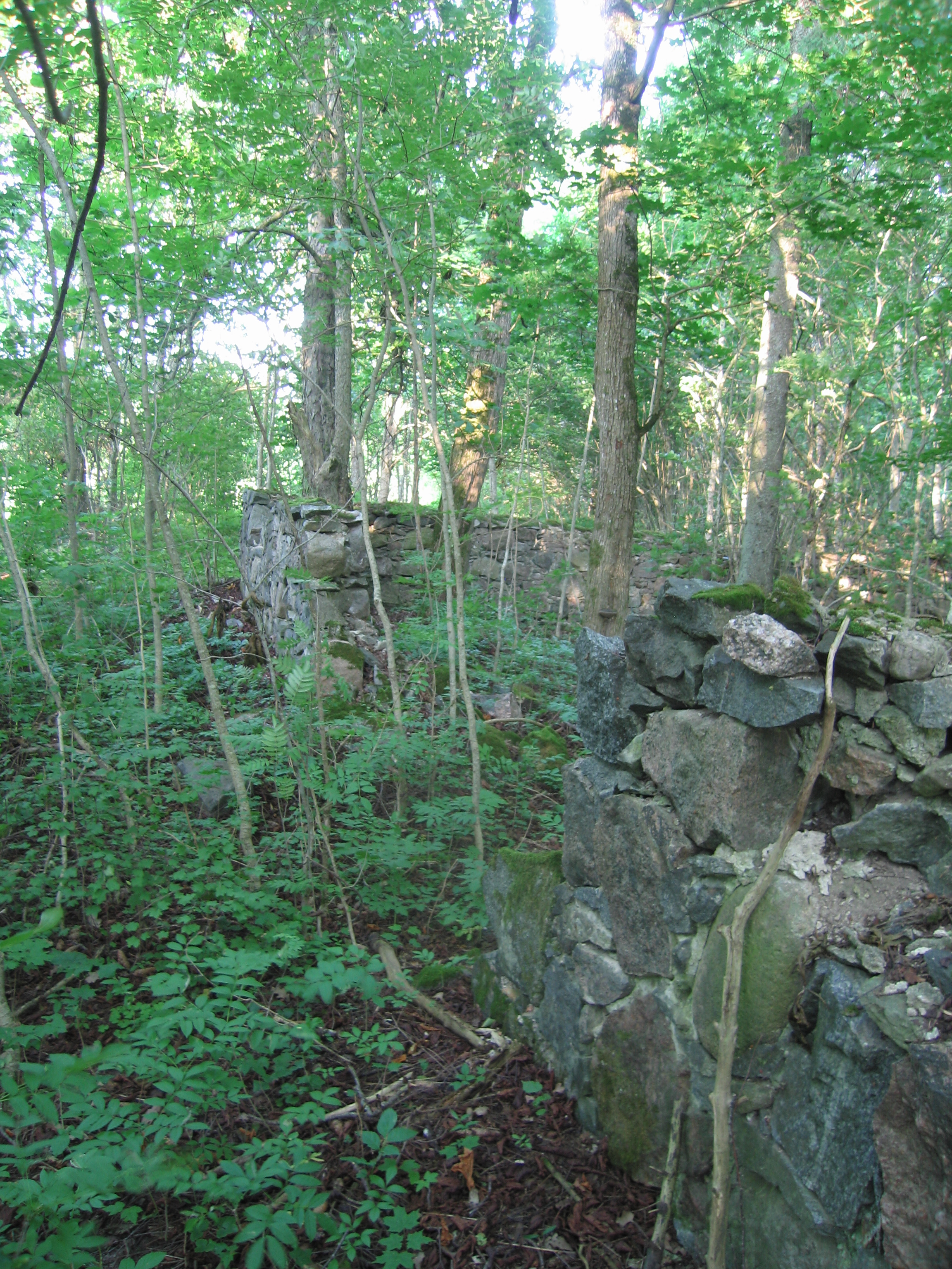 Värava asukoht kalmistu loodeküljel